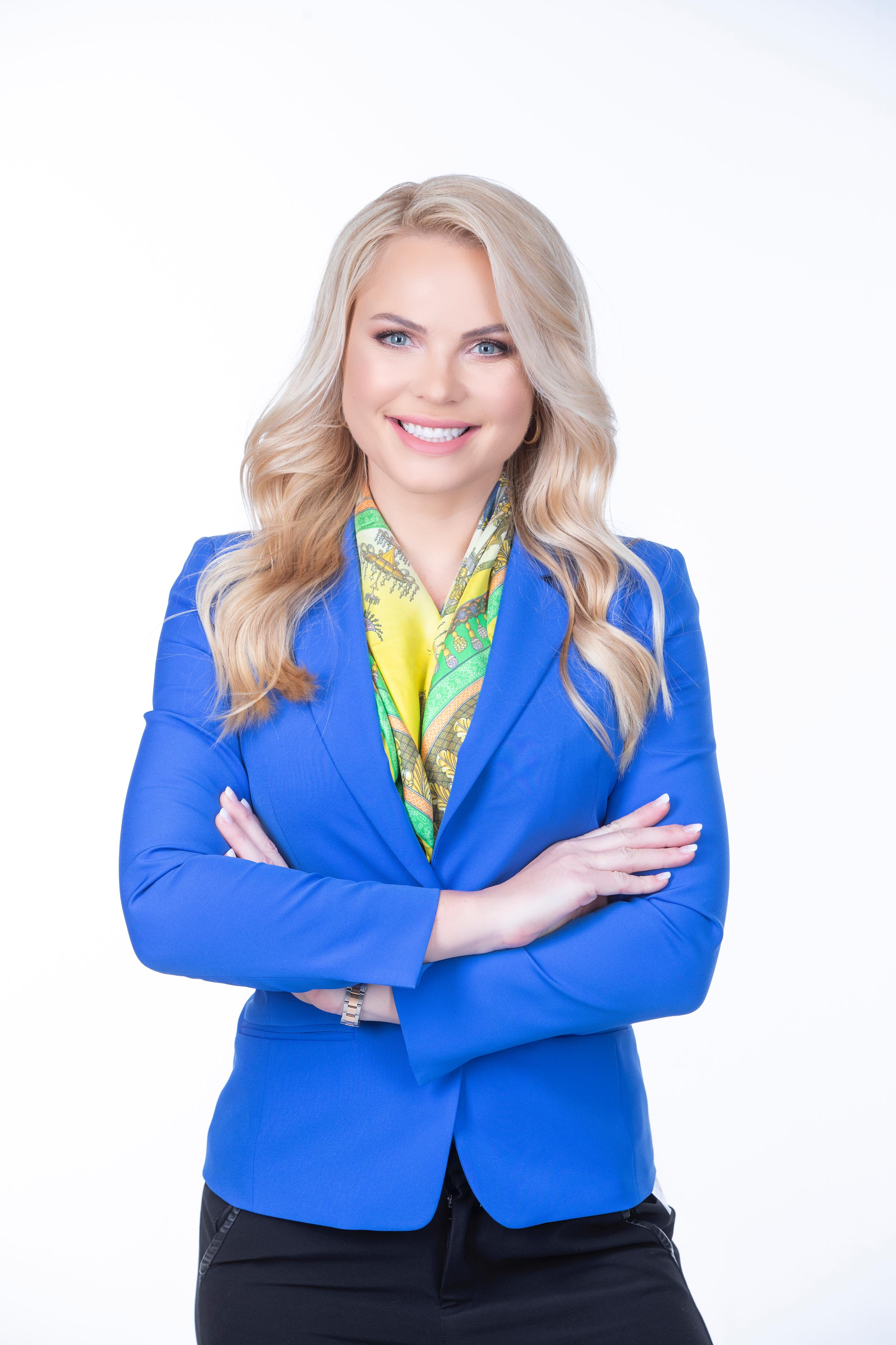 Naeratusega